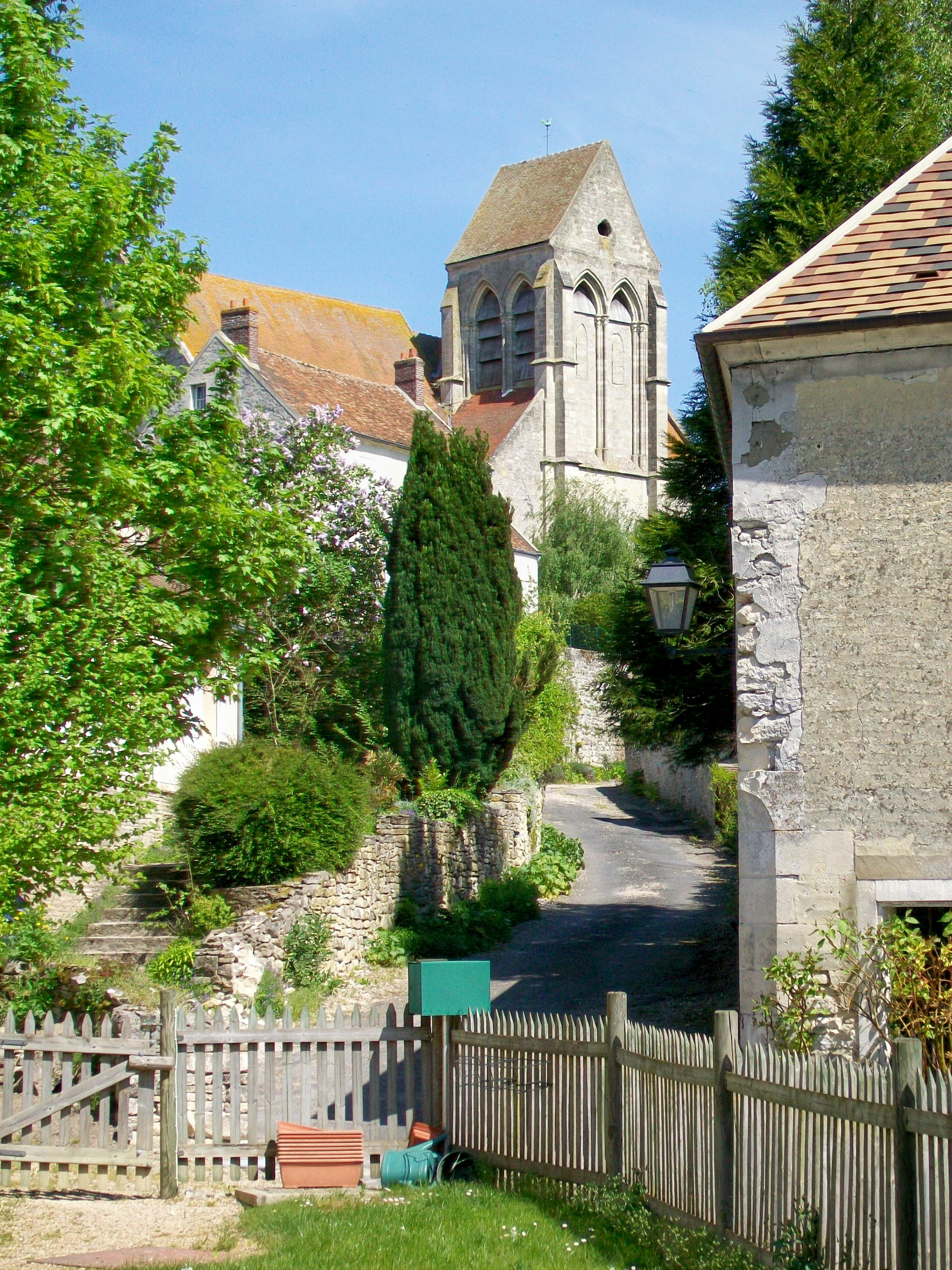 L'église Saint-Martin sur sa butte, vue depuis le bas de la rue de la fontaine Saint-Martin.